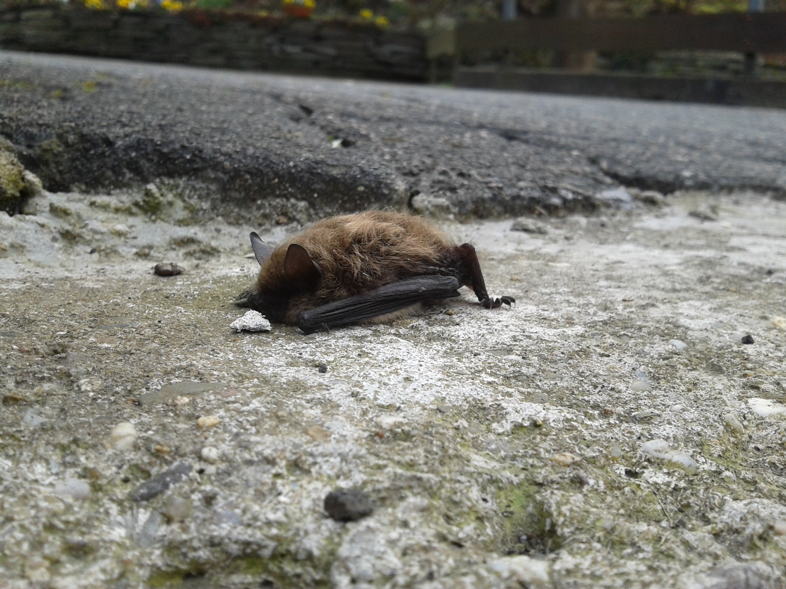 Kleine Bartfledermaus (Myotis mystacinus), fotografiert in Schmallenberg-Lenne (Germany)